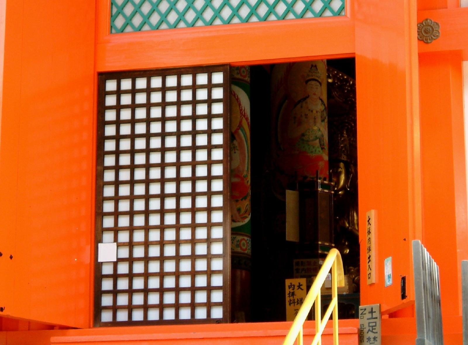 高野山 根本大塔